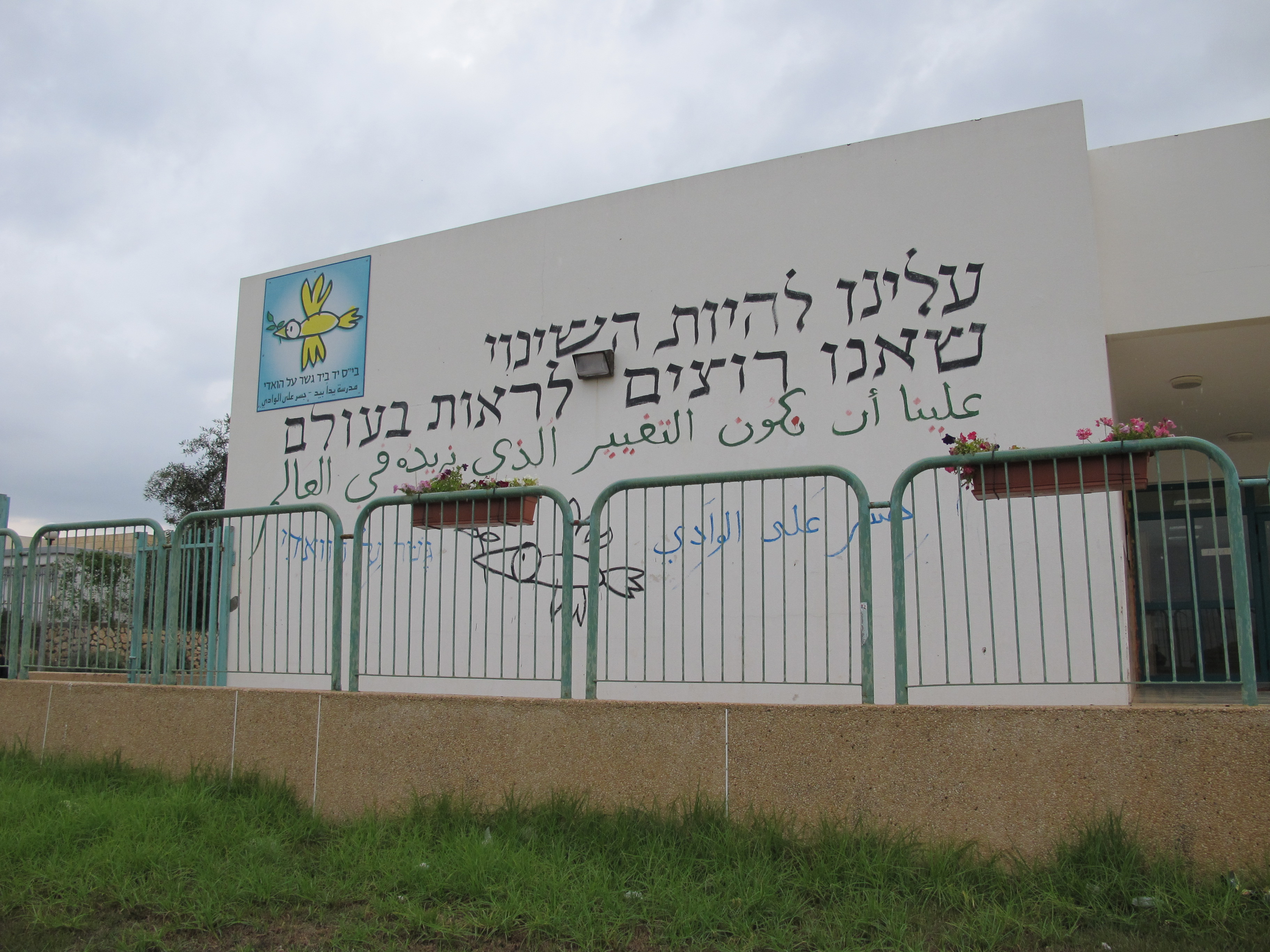 הכניסה למתחם בית הספר הדמוקרטי הדו-לשוני "גשר על הואדי" בכפר קרע